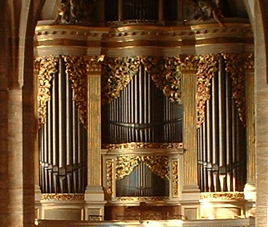 Freiberger Dom, Silbermannorgel